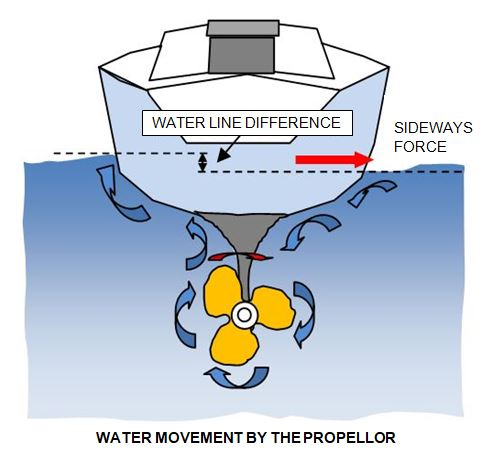 Radial movement of propellor water